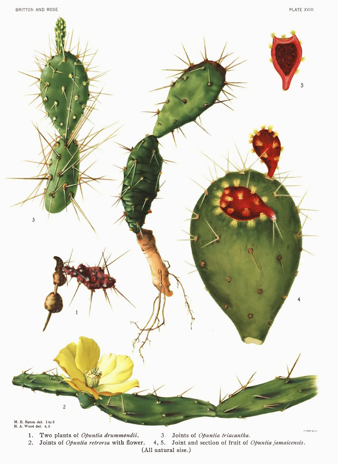 Kaktus növləri.